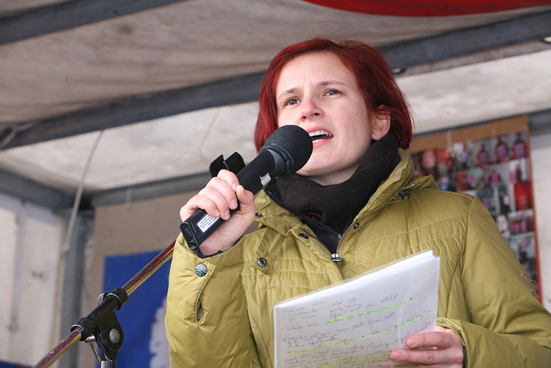 Katja Kipping, Politikerin der Partei „Die Linke“, auf einer „Dresden Nazifrei“-Demonstration im Februar 2010.